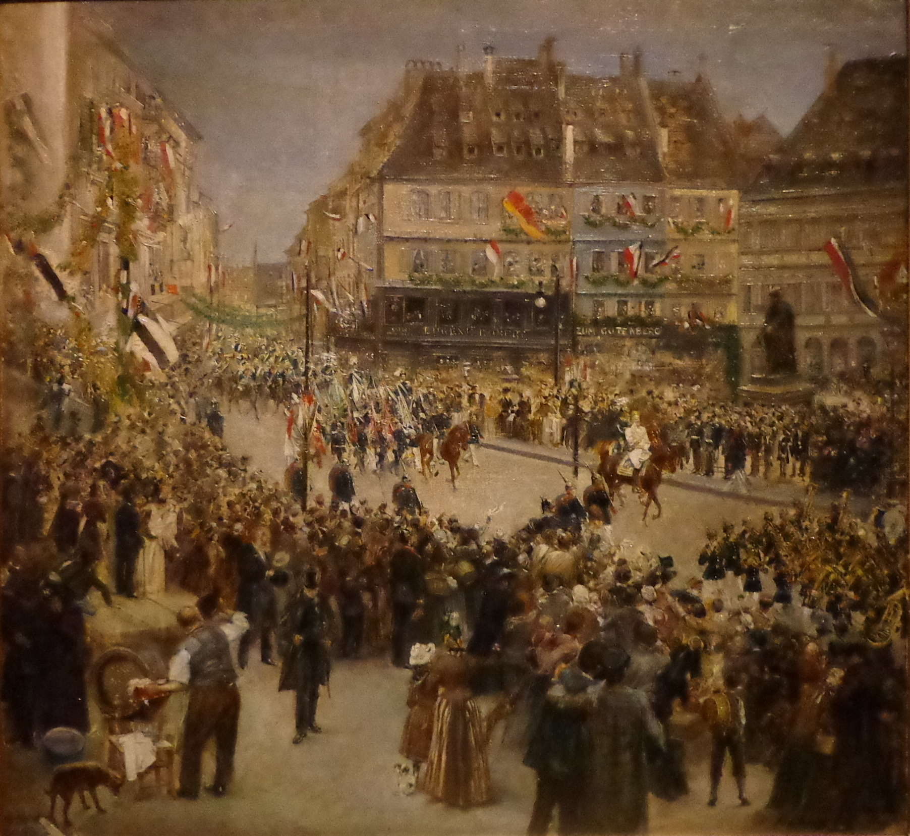 Tableau de Max Lieberg (1856-1912), peint avant 1891